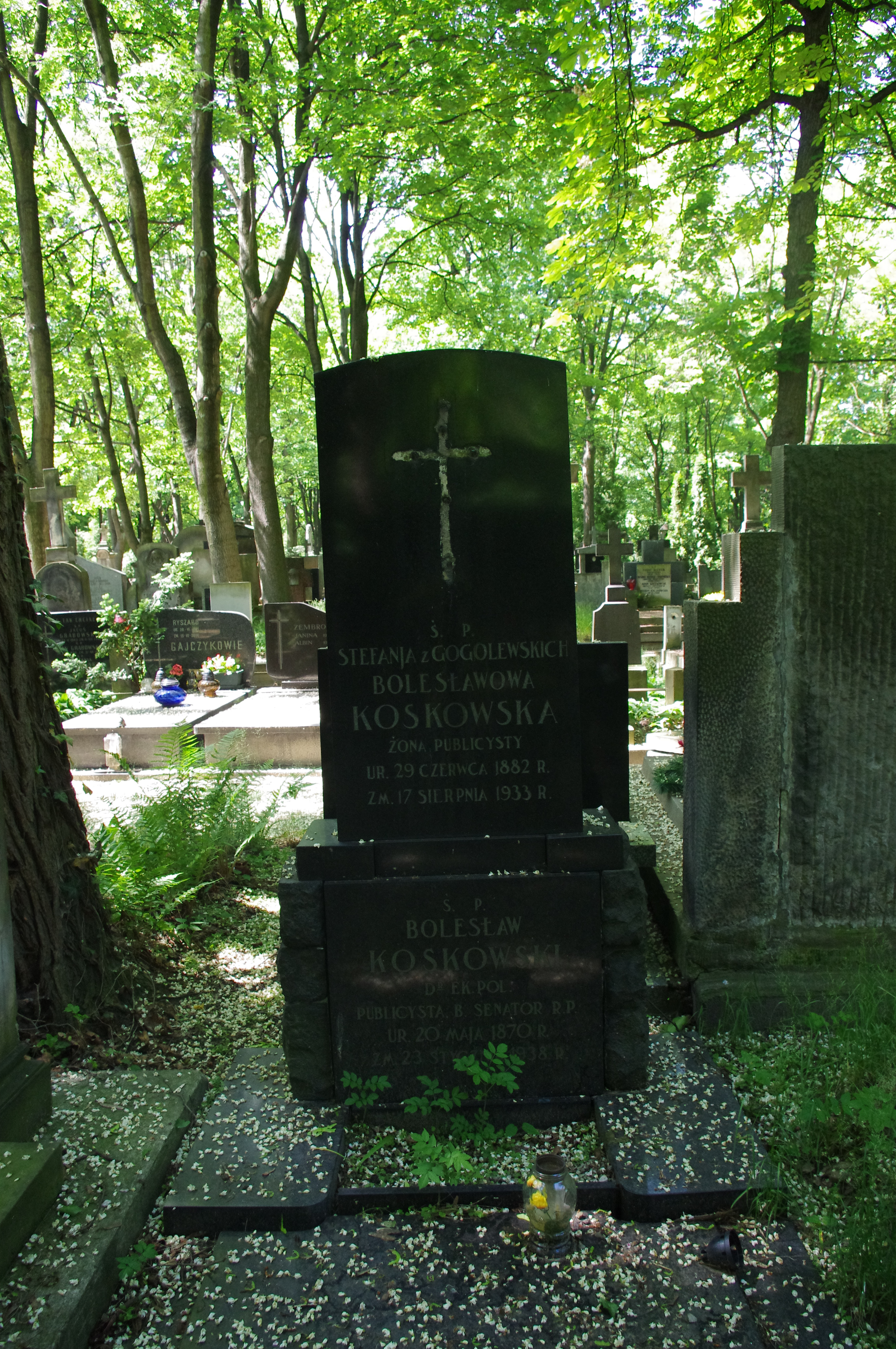 Grób senatora Bolesława Koskowskiego na Cmentarzu Powązkowskim w Warszawie